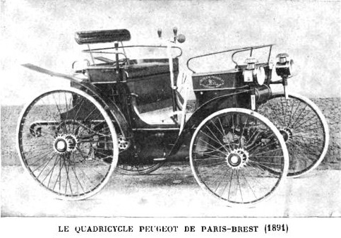 Le quadricycle Peugeot de Paris-Brest-Paris en 1891, piloté par Rigoulot ingénieur et Doriot contremaître, Histoire de l'automobile, Pierre Souvestre, éd. H. Dunod et E. Pinat, 1907 (ASIN B001BPBE58) p.208